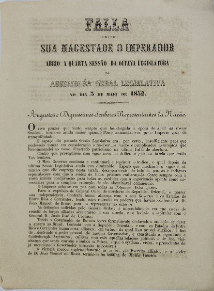 Fala ao trono em que o imperador do Brasil, Pedro II, abre os trabalhos da Assembleia Geral no dia 3 de maio de 1853.